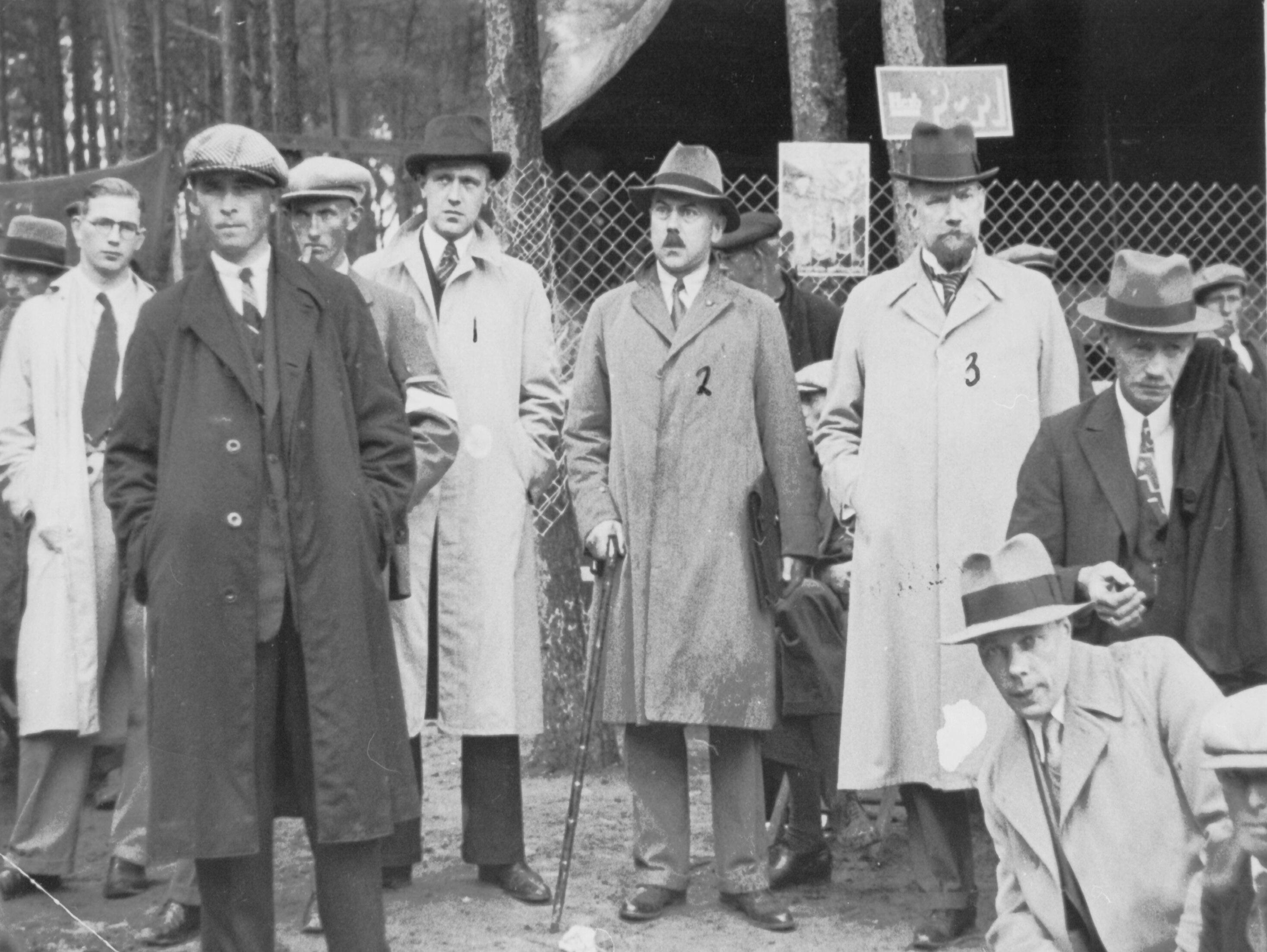 Midden met stok: Max de Marchant et d'Ansembourg, links van hem Jan Hollander, rechts van hem (met sik) mr. A.J. van Vessem